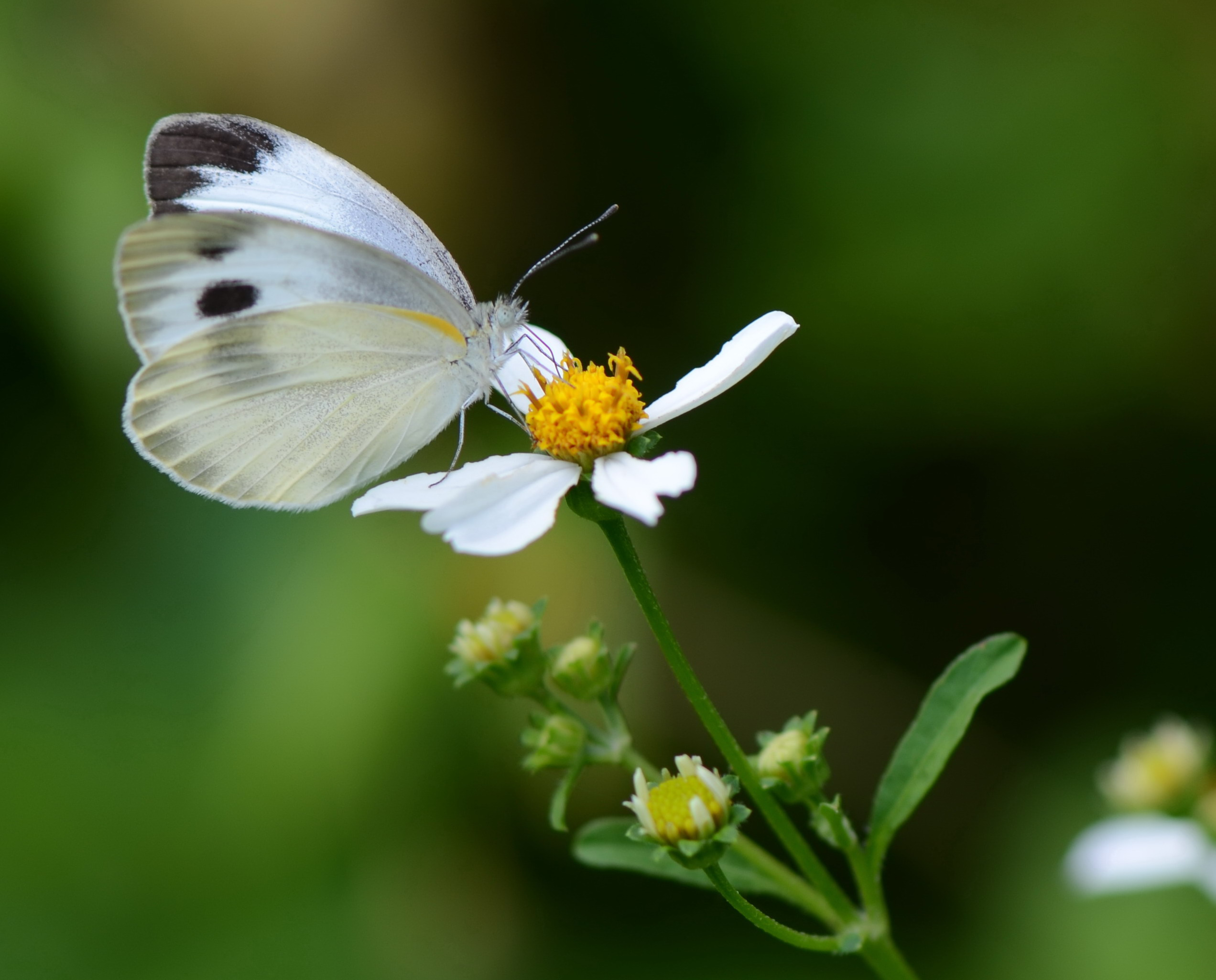 114台灣紋白蝶14(李淑惠攝)